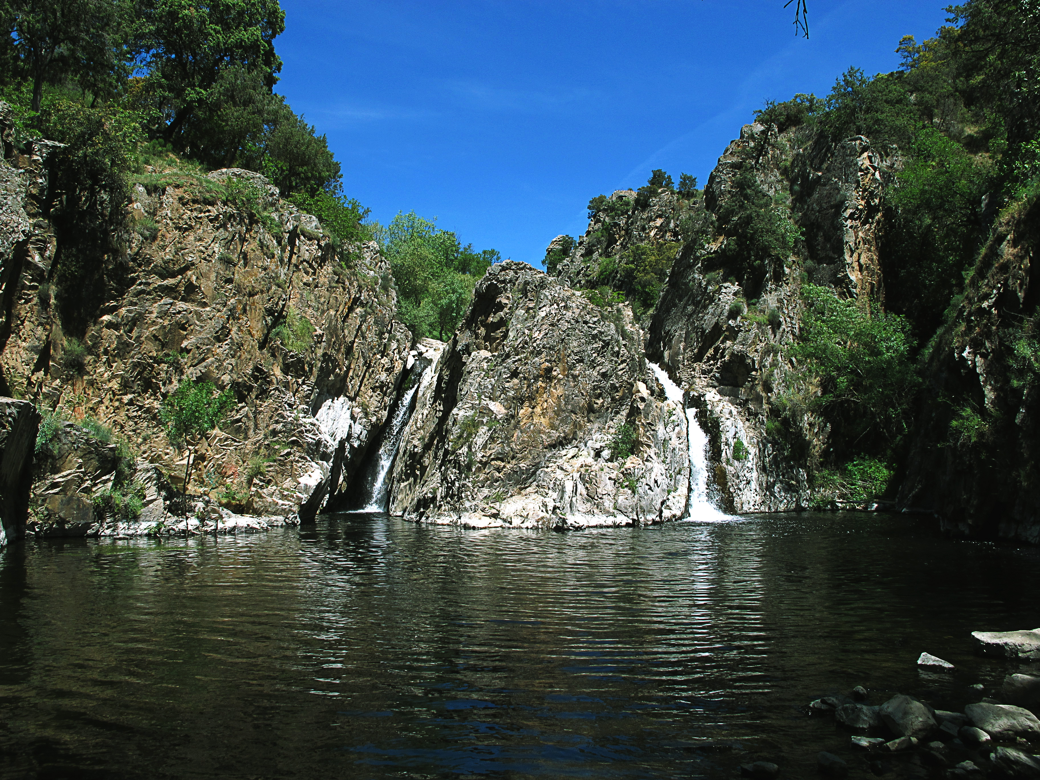 Aunque la Comunidad de Madrid es pequeñita, es preciosa Por unos peldaños que hay se desciende con precaución y un poco más adelante aparece la poza y la cascada conocida como “el Hervidero”, que aunque ya no forma el torbellino que formaba antes de represarse el río, aún, en épocas de lluvia o cuando se abren las compuertas de los embalses se puede apreciar este conjunto natural. Pertenciendo el salto de la derecha a Pedrezuela y el de la izquierda y el charco a San Agustín. “Son notables el salto y charco del Hervidero, que forman sus aguas (las del río Guadalix) unos cuatro kilómetros más arriba de San Agustín, el primero de seis metros de altura sobre el agua, y el segundo de bastante profundidad, en el cual se cría mucha pesca”, describía Casiano del Prado en 1864, año en que vio la luz la 'Descripción física y geológica de la provincia de Madrid’